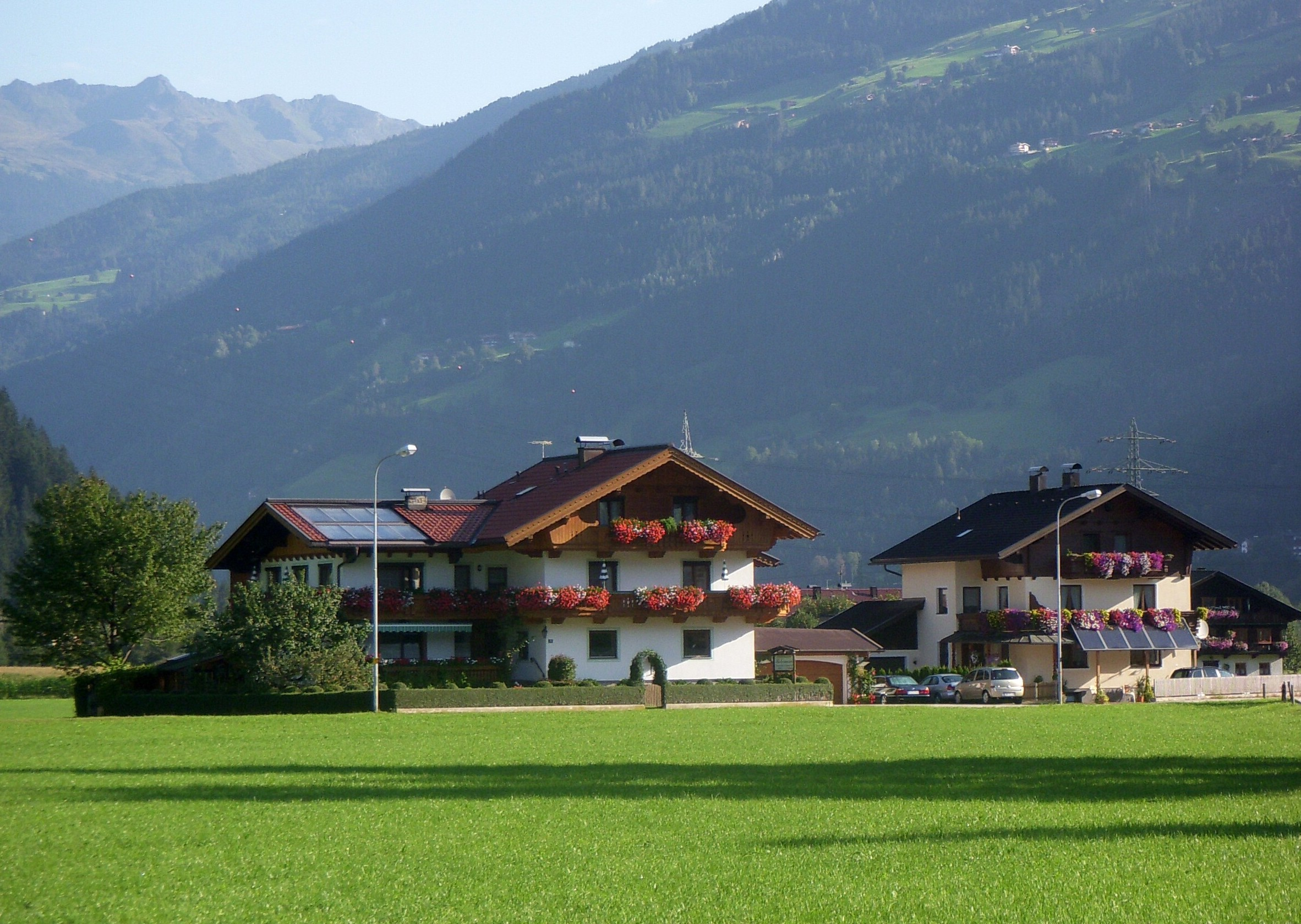 Typiska byggnader i Zell am Ziller, Zillertal (Österrike)